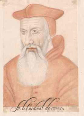 Anne de Perusse d'Escars, cardinal de Givry